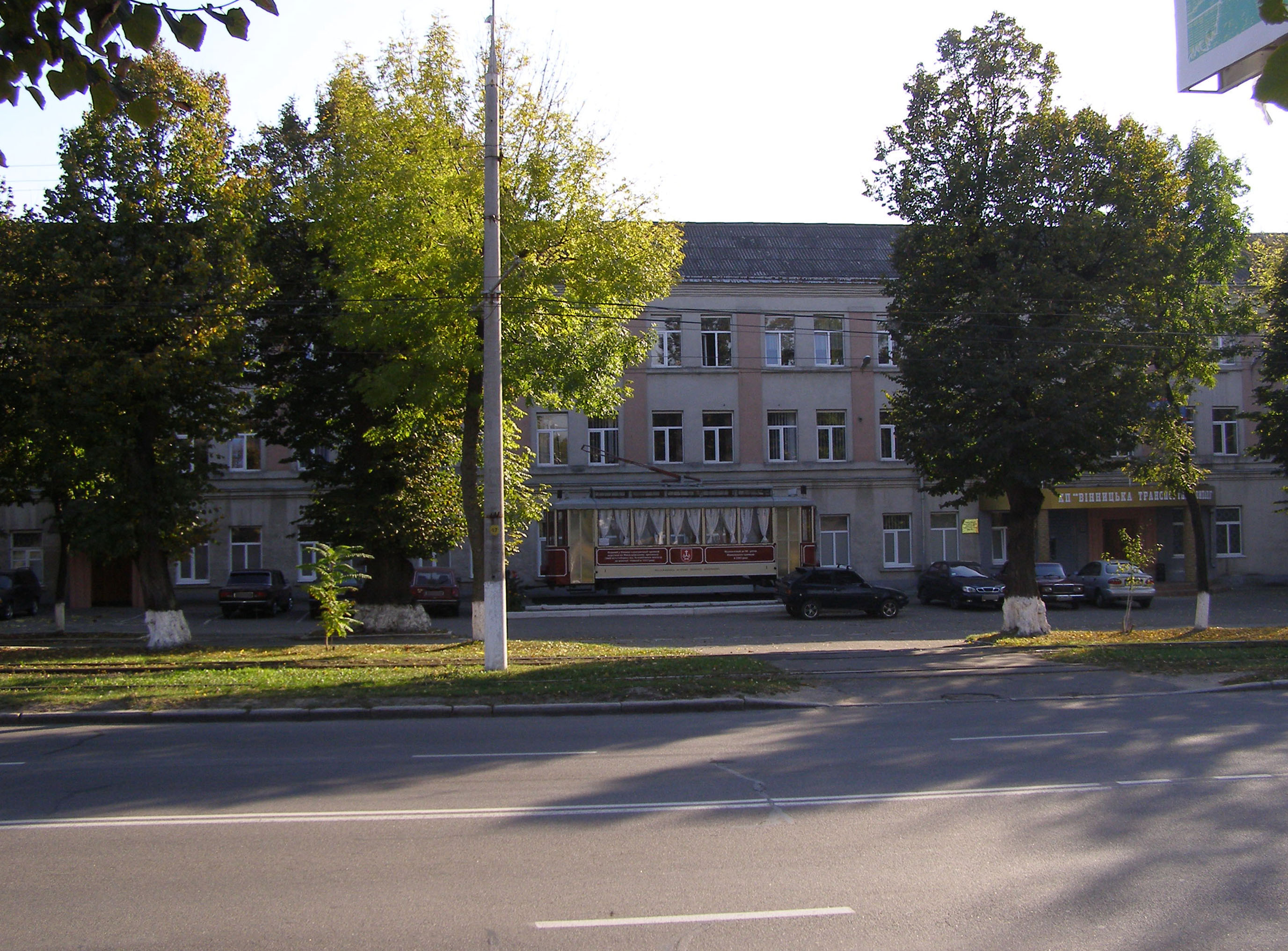 Вінниця, Хмельницьке шосе, 29. Вінницька транспортна компанія